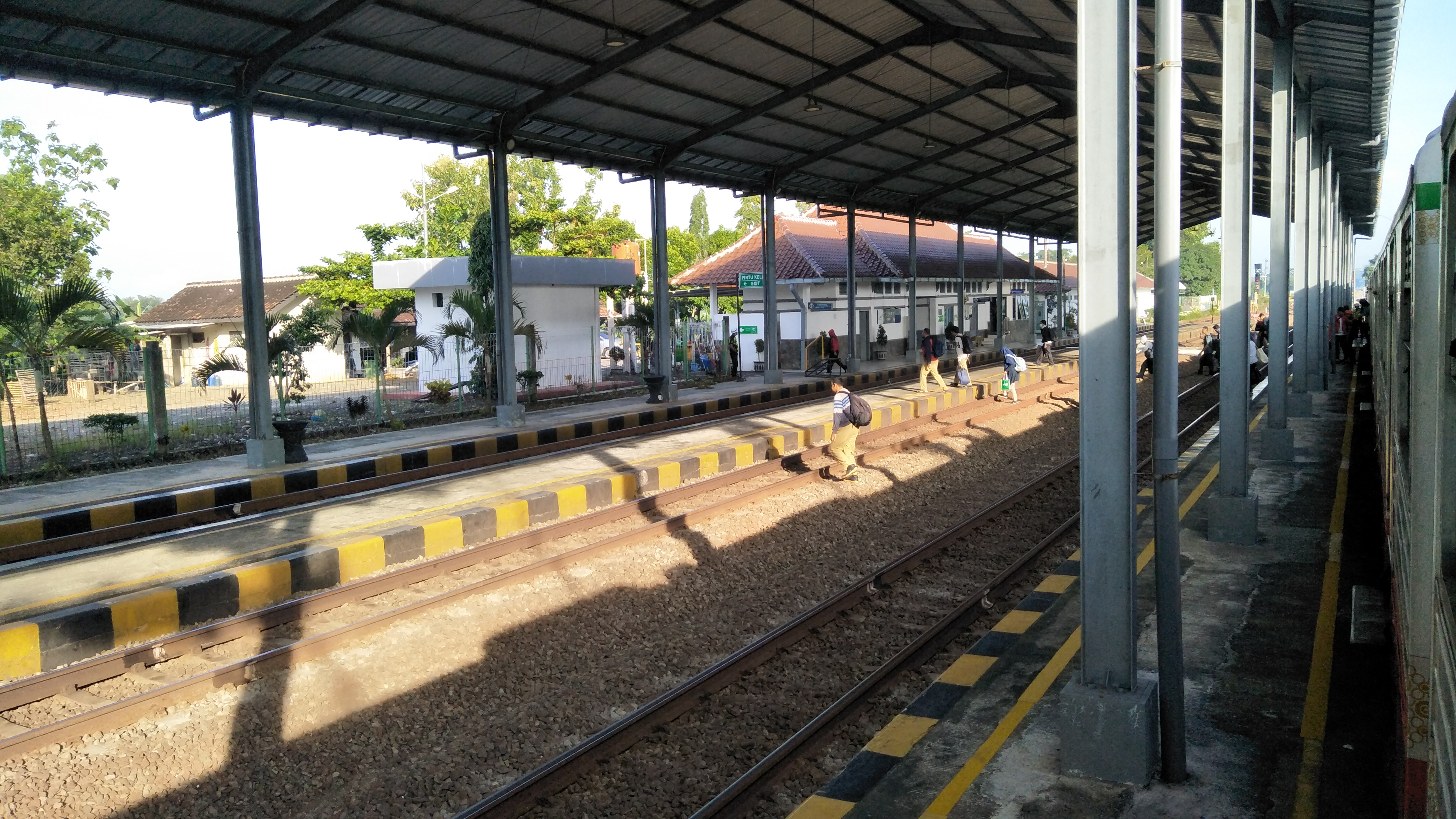 Stasiun Jenar